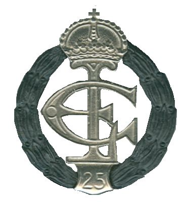 Krieger-Ehrenzeichen in Eisen Hessen 1917 Particuliere verzameling, Groningen